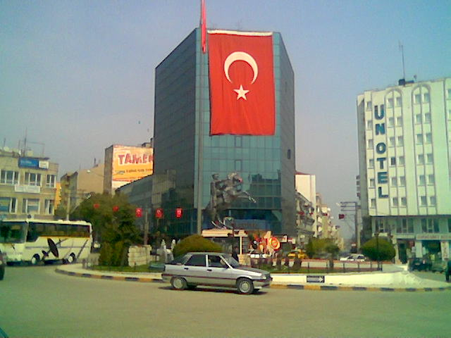 Karacabey Cumhuriyet Alanı